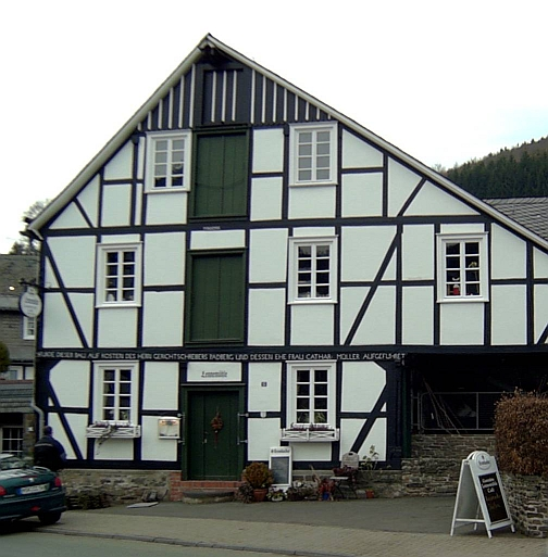 Lennemühle in Schmallenberg-Oberirchen, Germany.